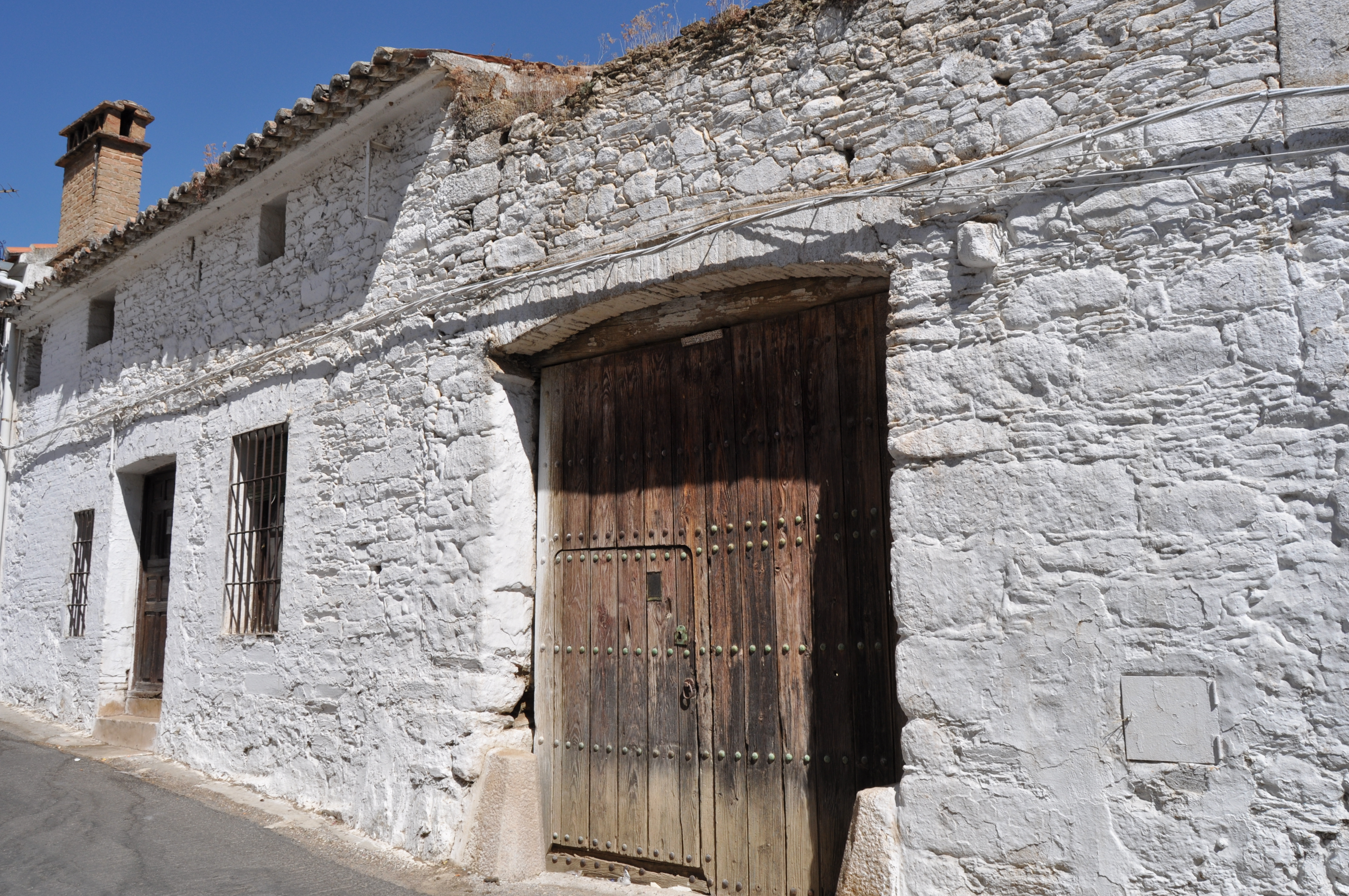 Valdelacasa del Tajo - 023